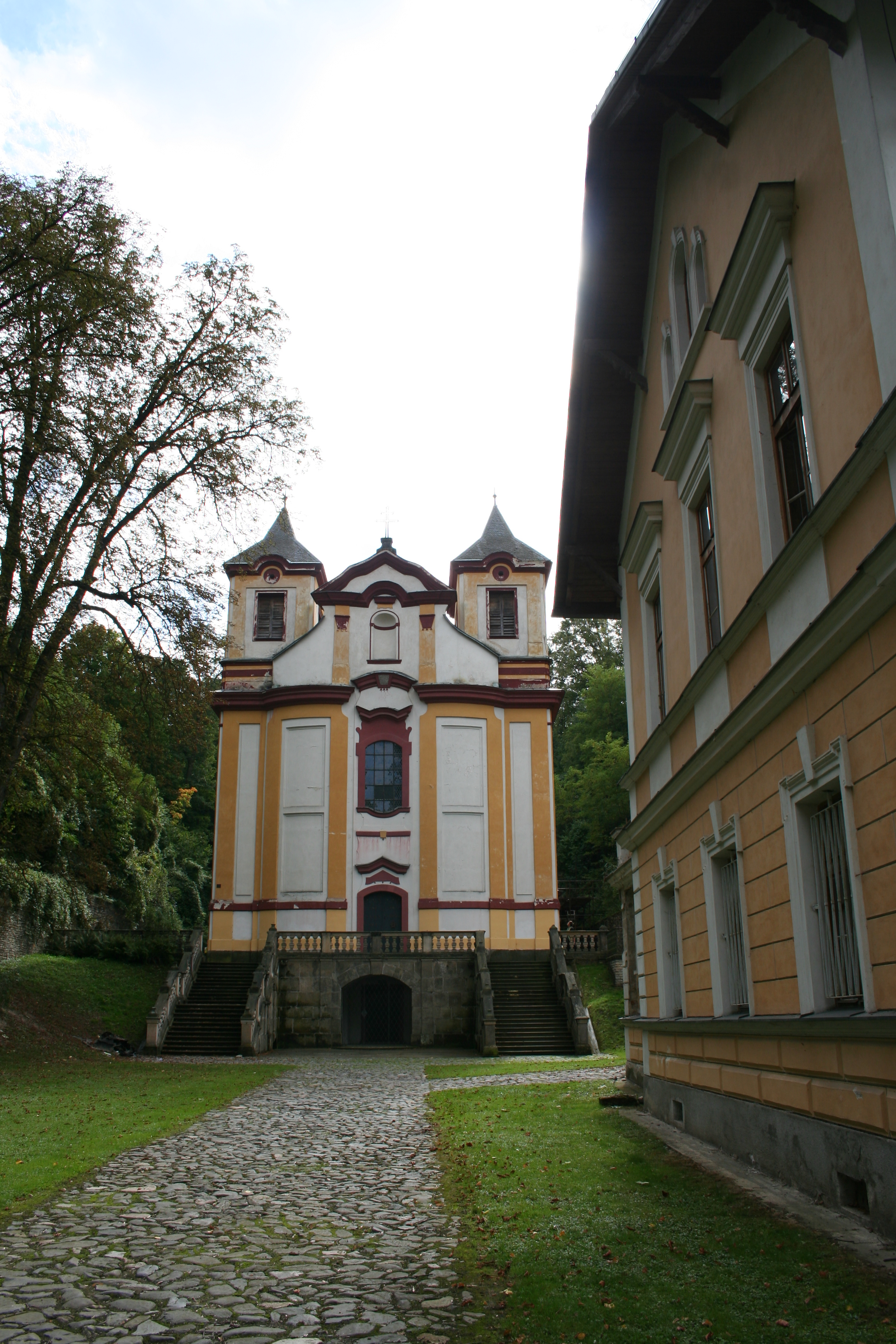 Kostel sv. Mikuláše (Svatý Mikuláš), Svatý Mikuláš